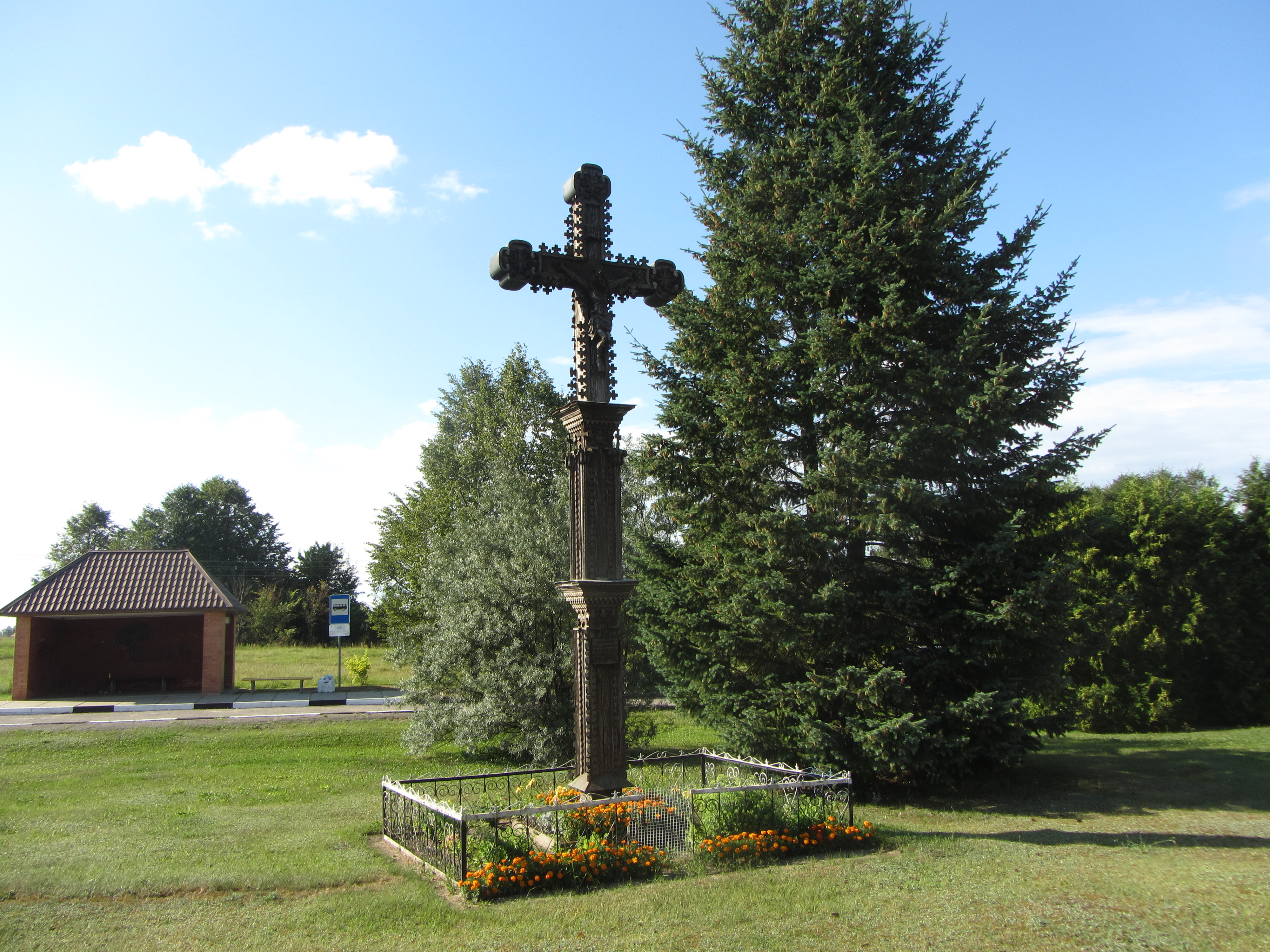 Sudeikiai, Lithuania